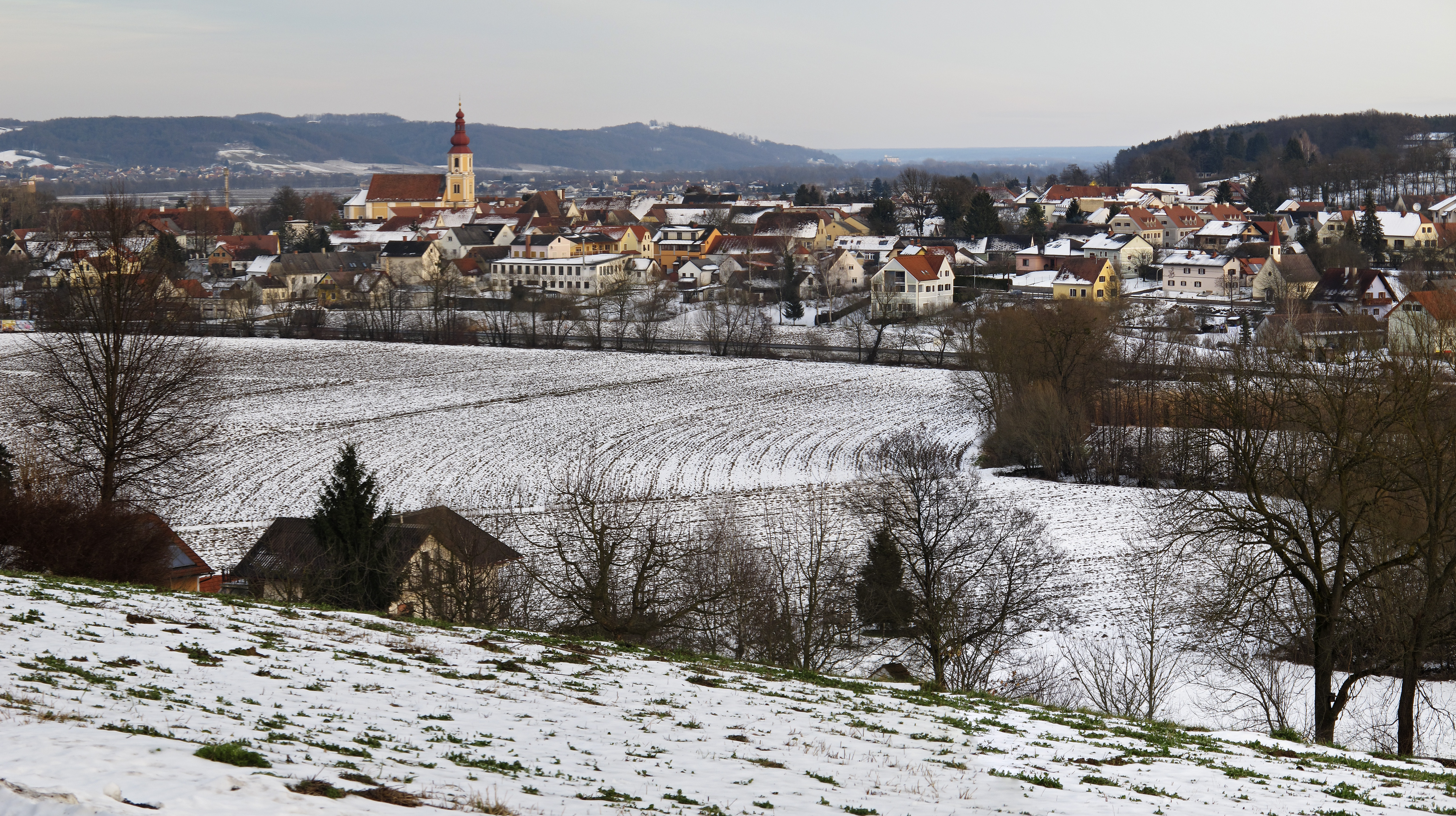 Blick auf den Ort Fehring von Südwest